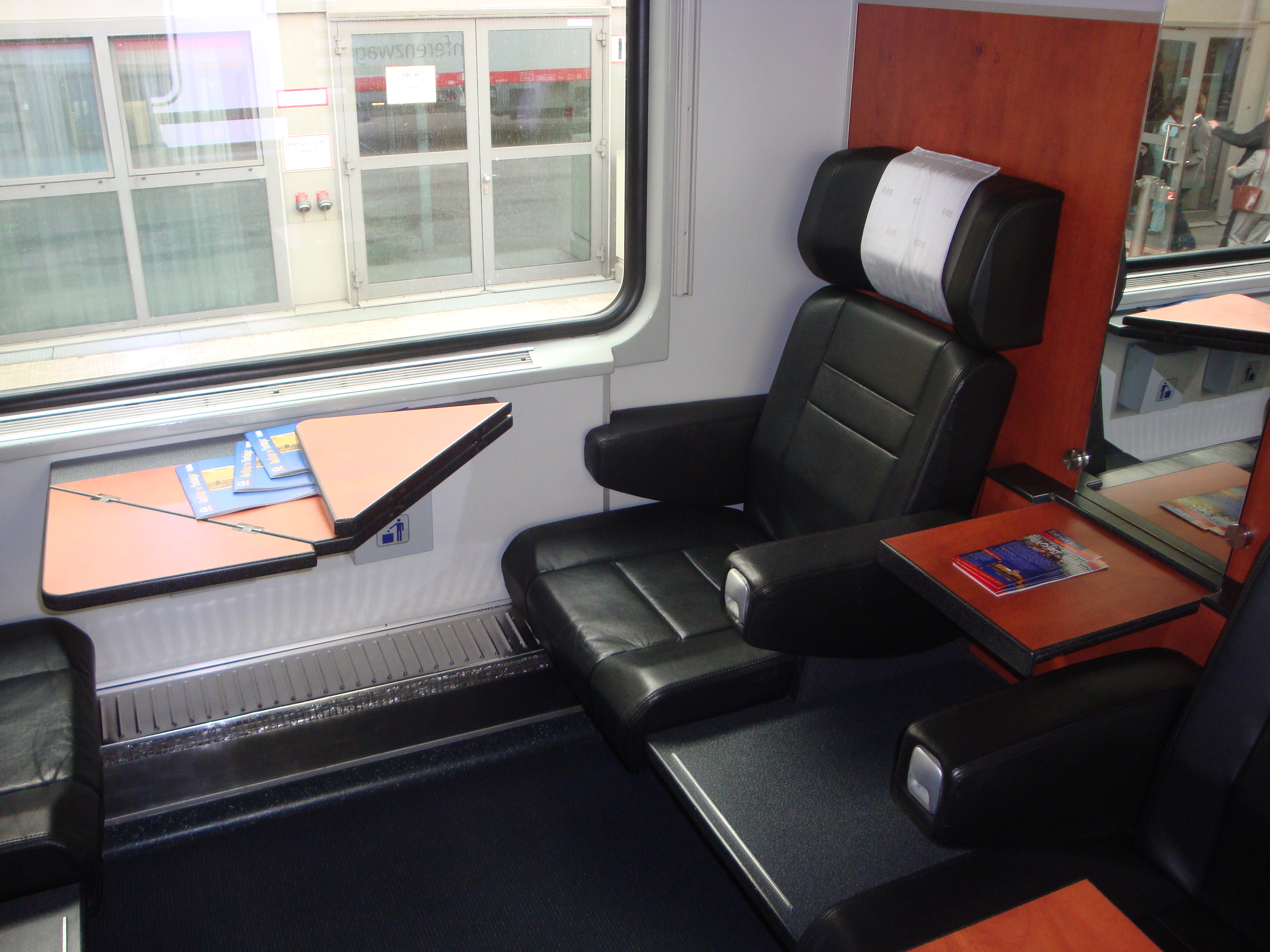 Przedział menedżerski w pociągu ÖBB kolei austriackich zaprezentowany podczas targów turystycznych ITB Berlin.